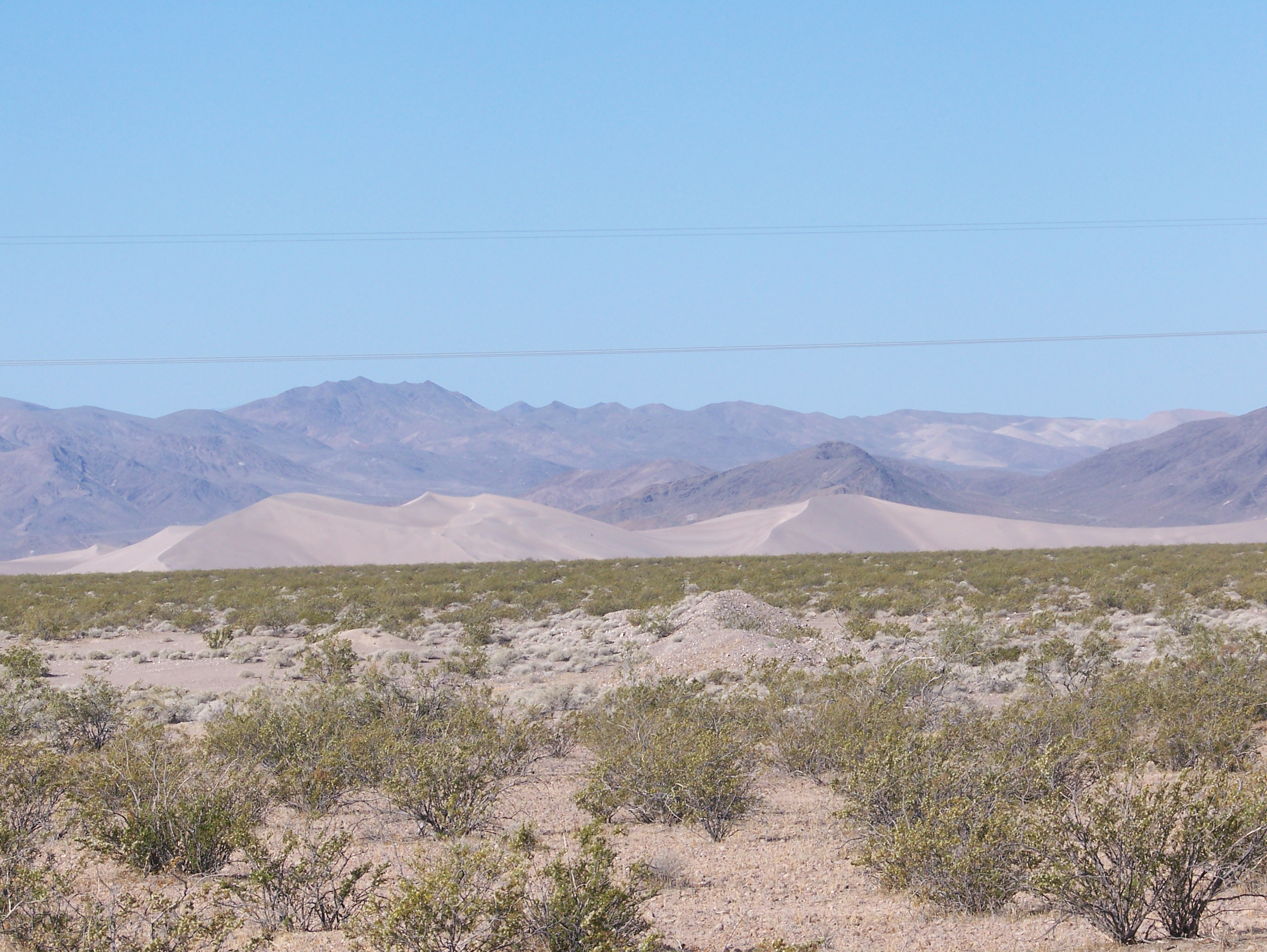 Amargosa Valley, Nevada